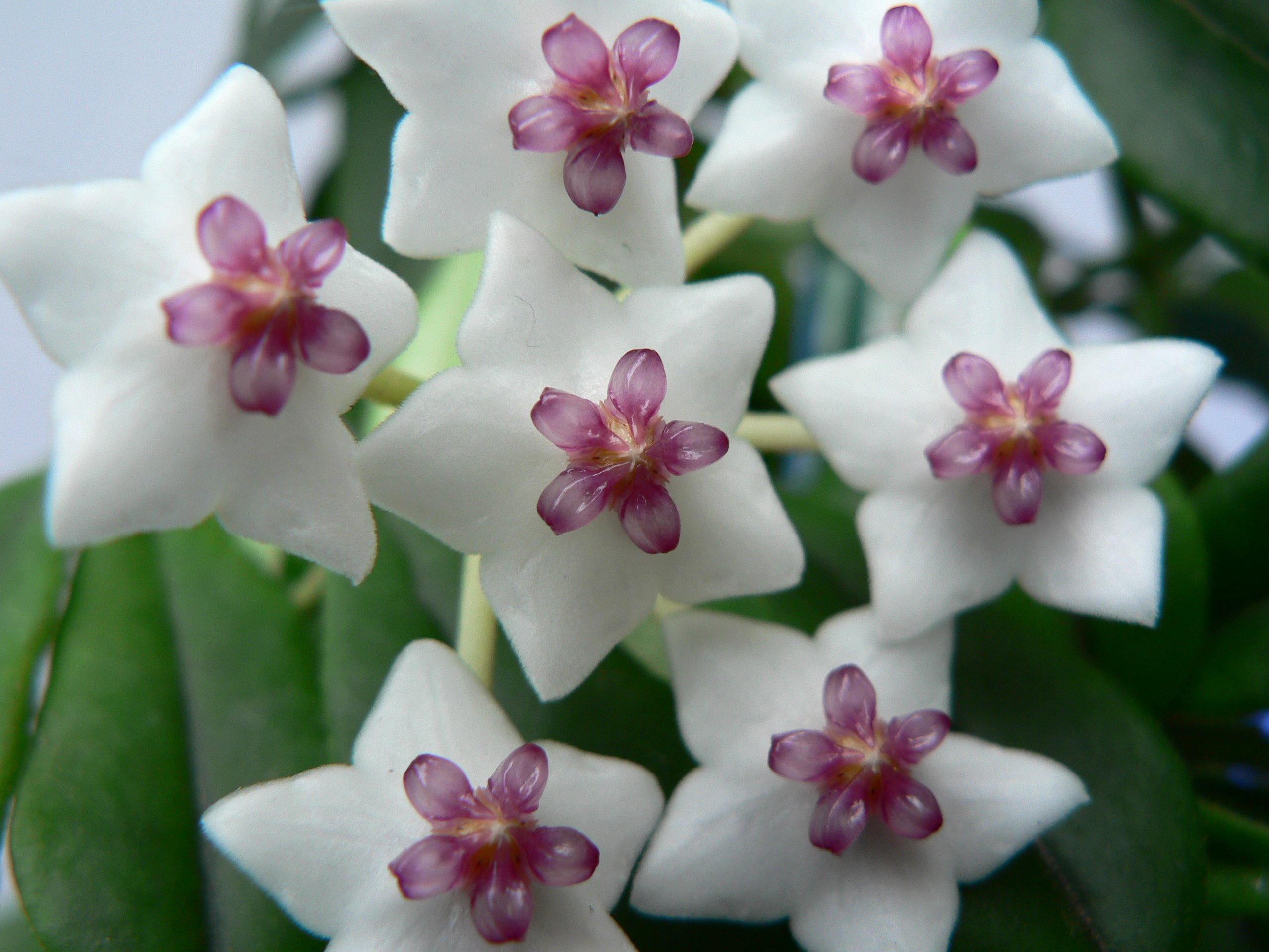 Fleurs de Hoya Bella